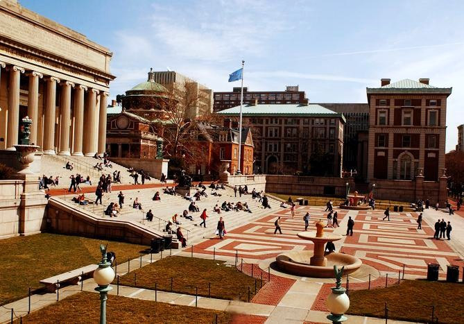 the plaza of Low Memorial in the campus of Columbia University at 116th Broodway st., New York City.....